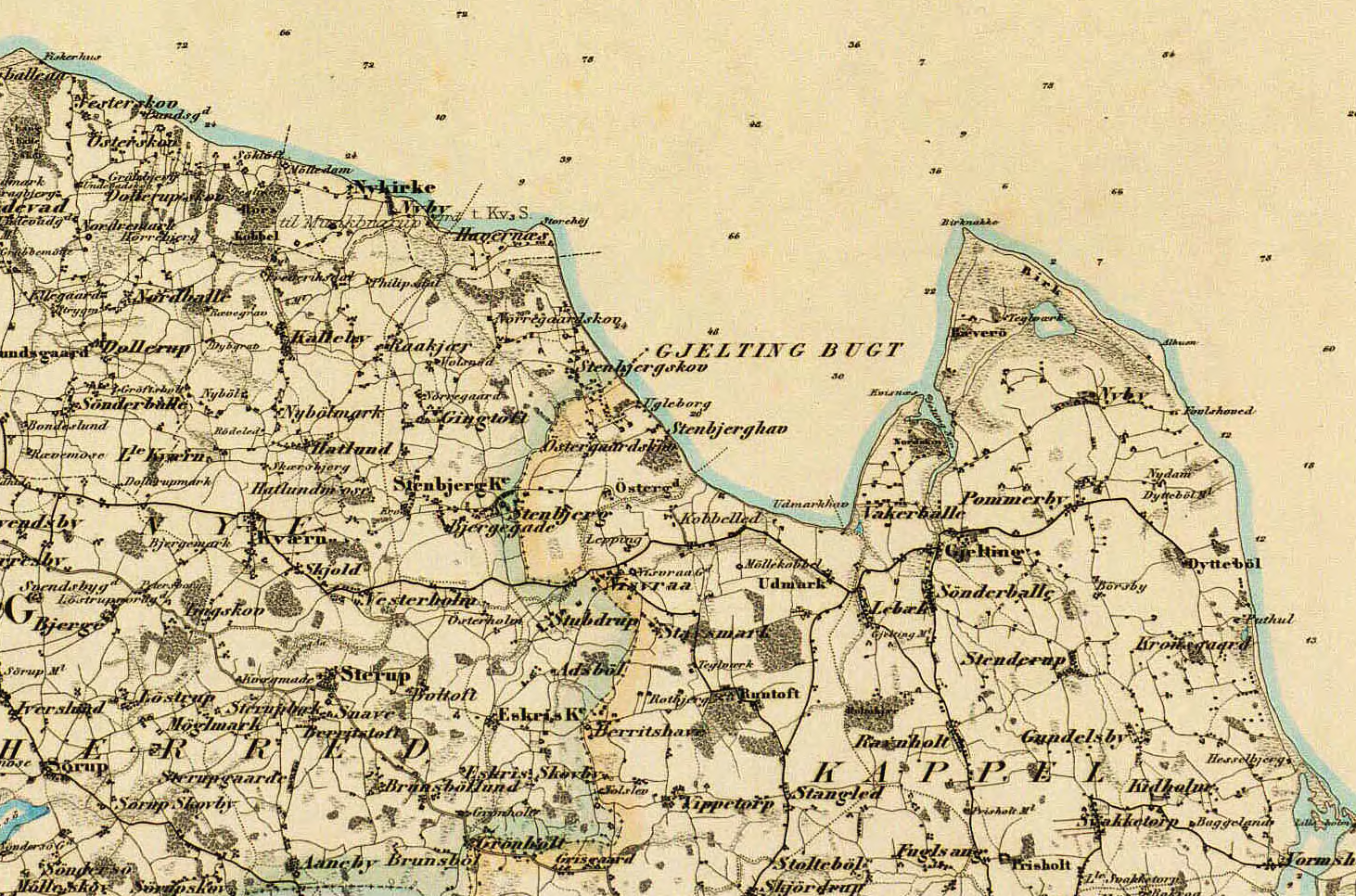 Generalstaben Videnskabernes Selskab: Kaart over Slesvigs Fastland og Als 4, østre blad, udsnit